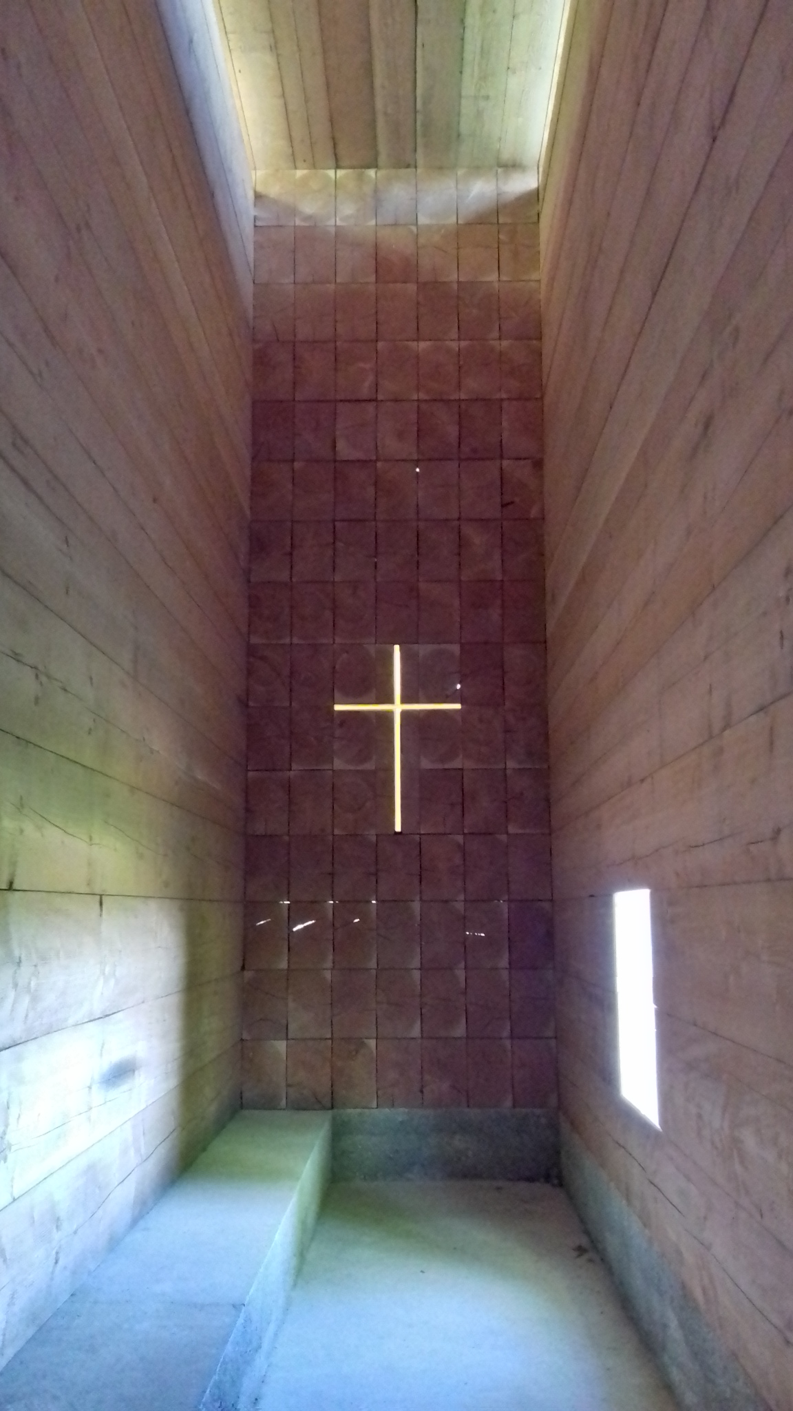 Kapelle in Unterliezheim, Teil des Architekturprojekts Sieben Kapellen